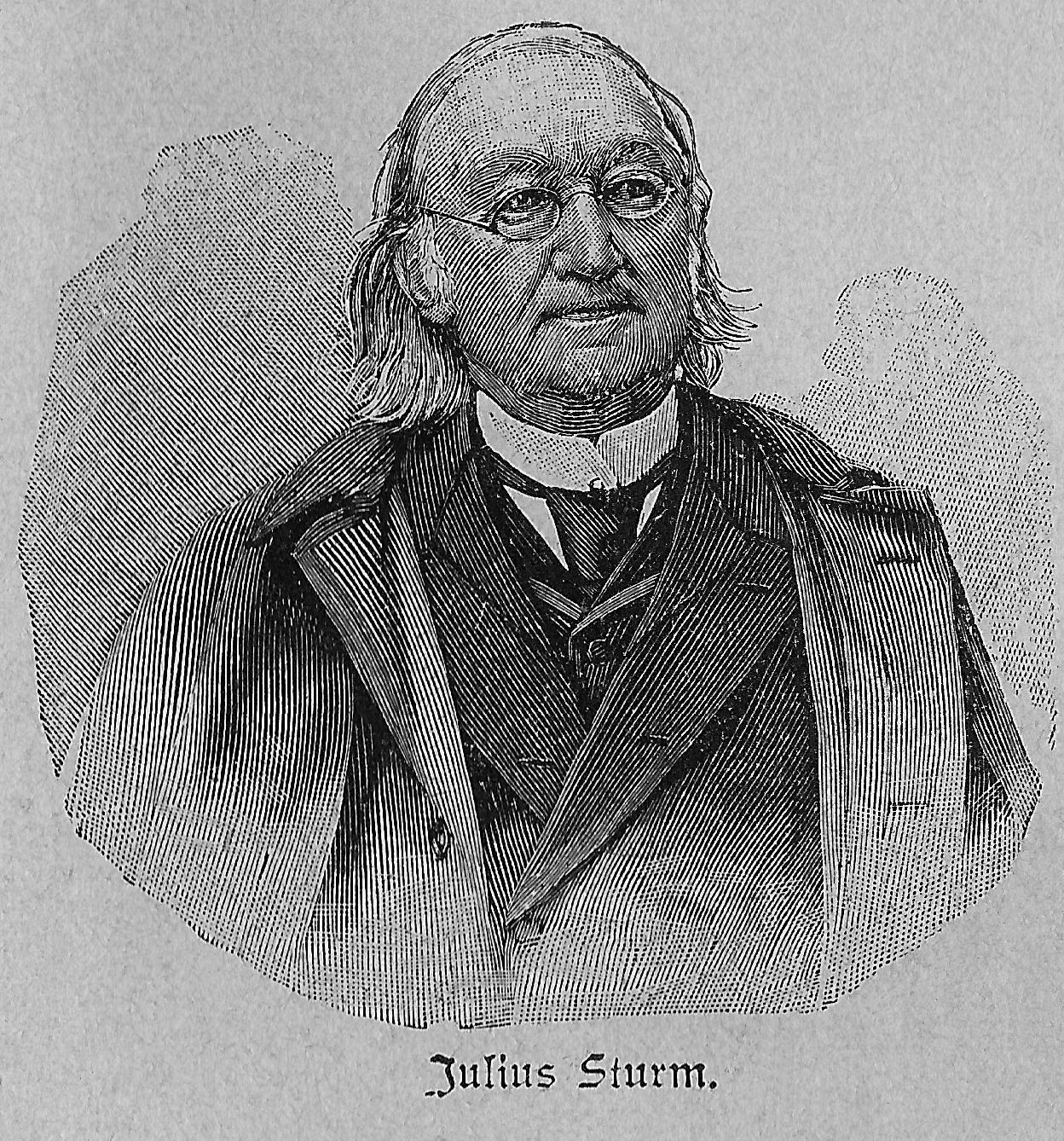 Julius Sturm, Dichter der Spätromantik